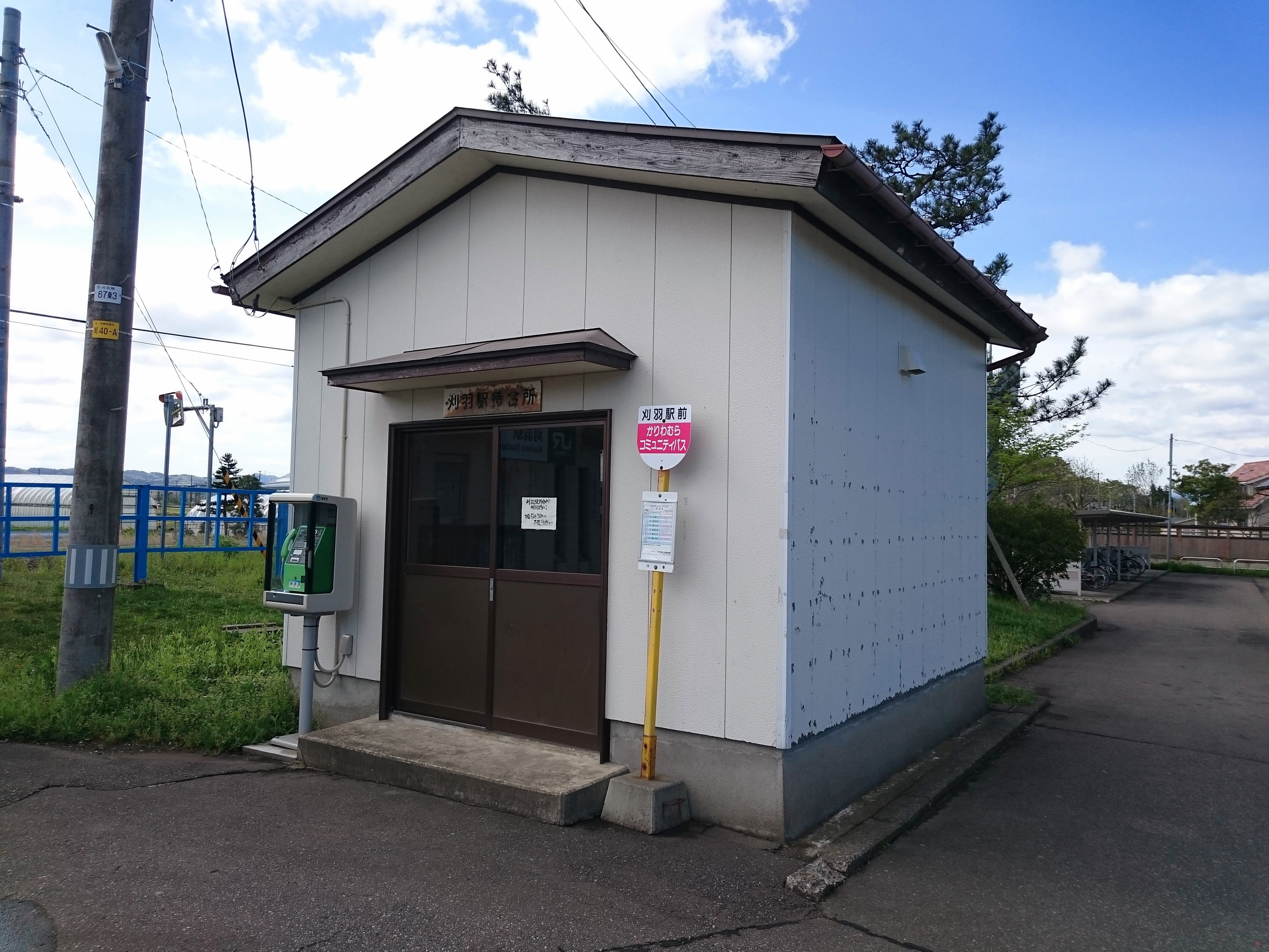 刈羽駅前のバス待合室